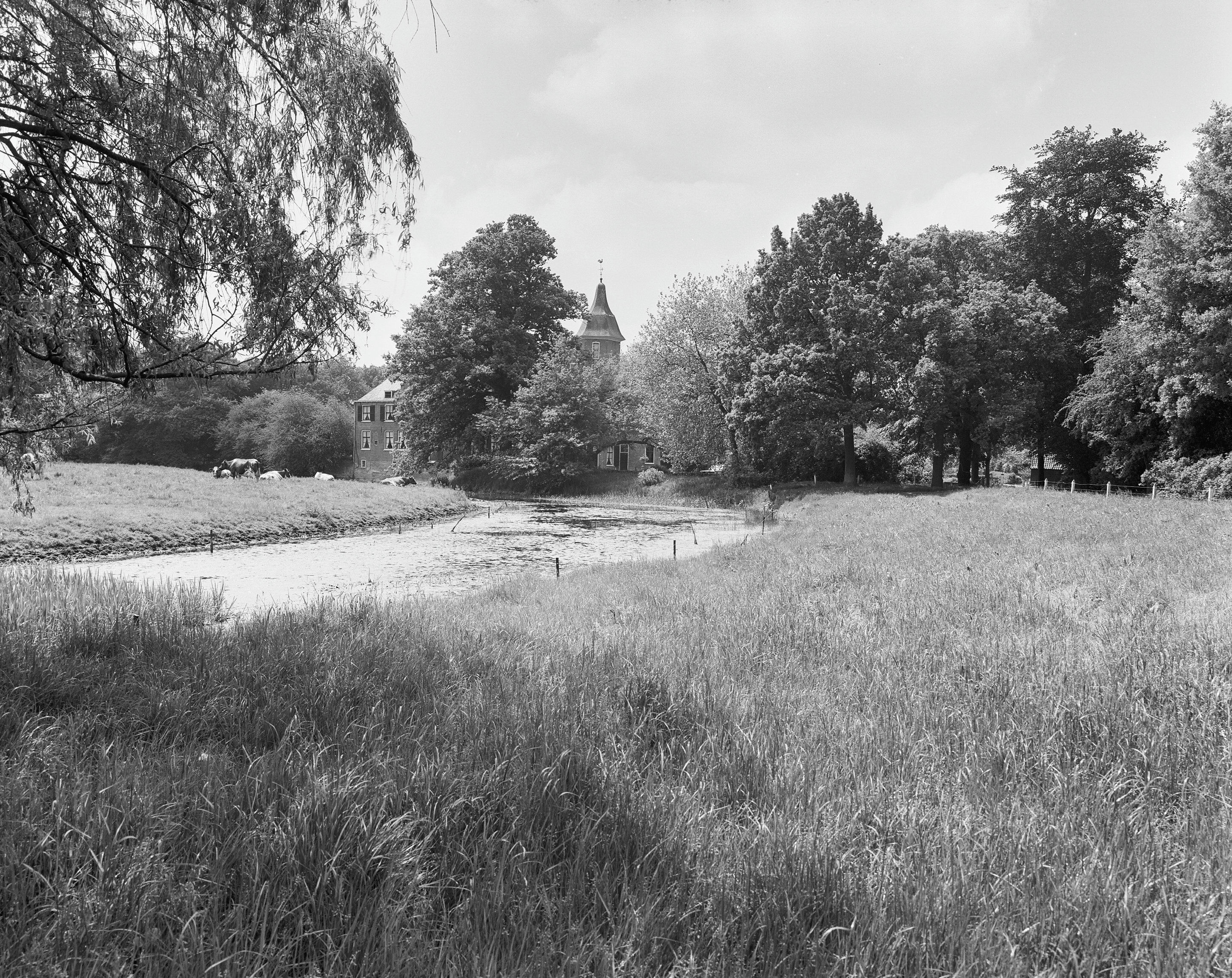 Kasteel Zwijnsbergen: overzicht